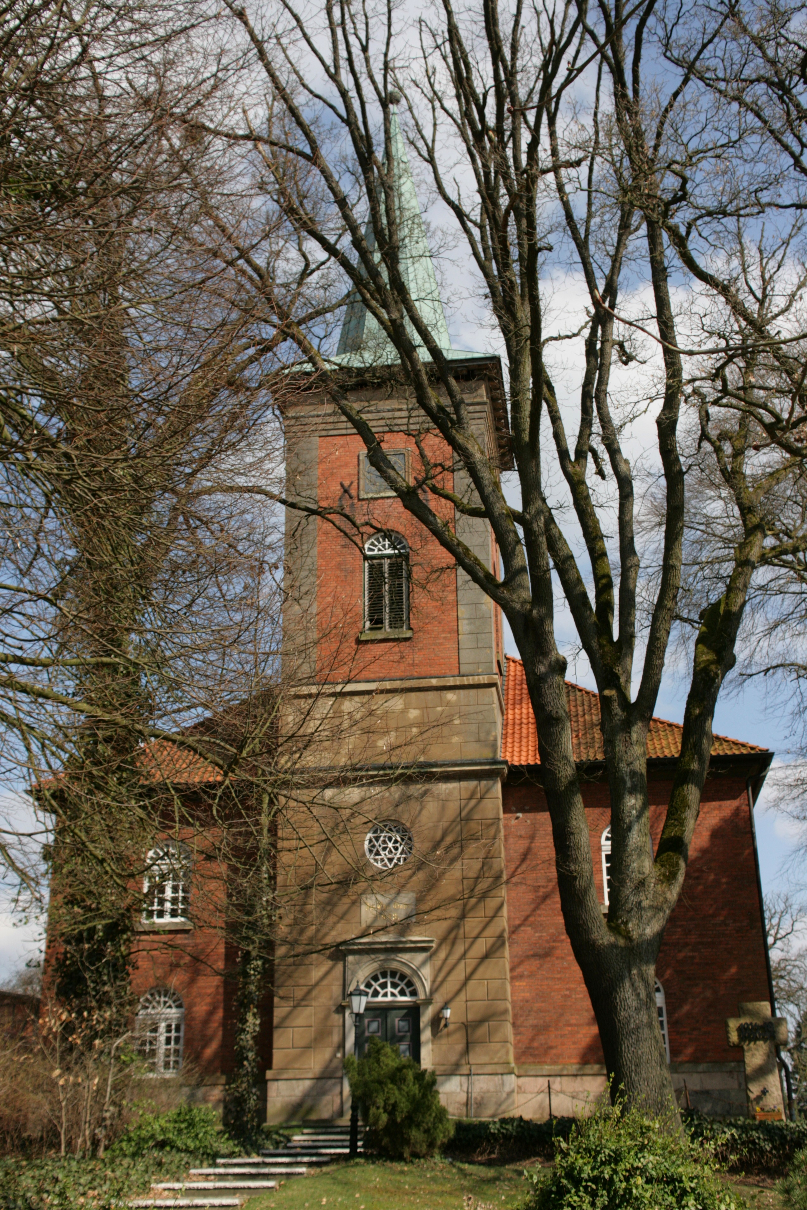 St. Bartholomäus, Göhrdestraße in Himbergen